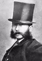 Foto Emilio Praga